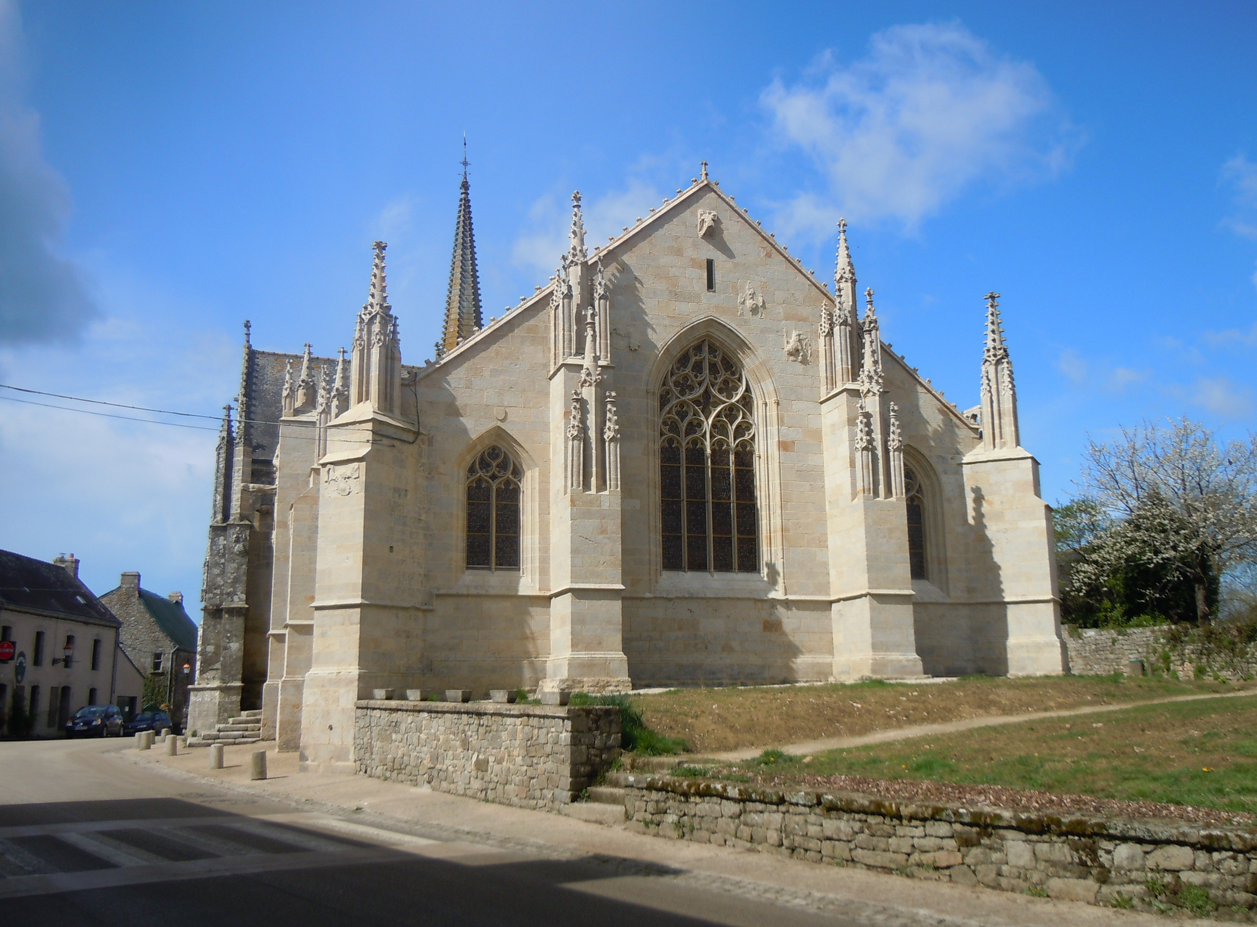 chevet de l'église Notre-Dame de Kernascléden ( département du Morbihan)